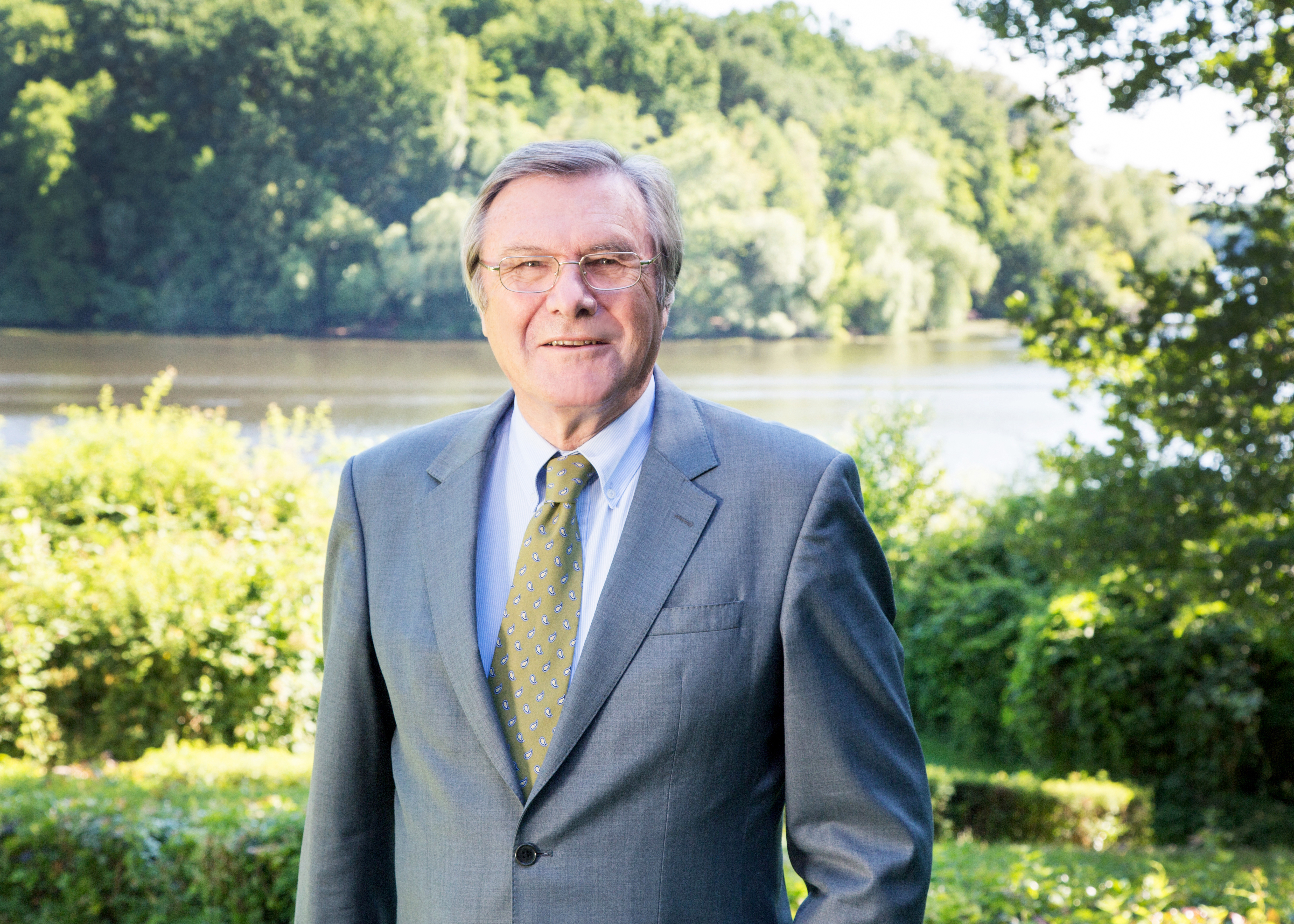 Vorstandsvorsitzender Wolfgang Gerhardt, 2016.